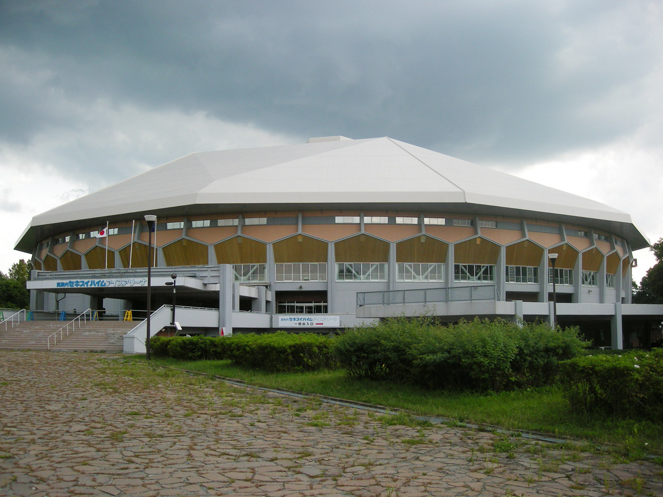 撮影場所:真駒内アイスアリーナ